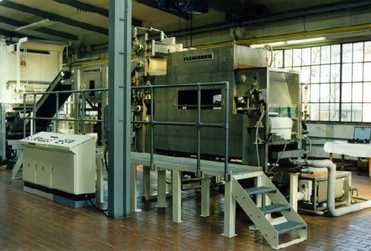 Ultraschall-Technikumsanlage zum Ultraschallaufschluss SETRALIT